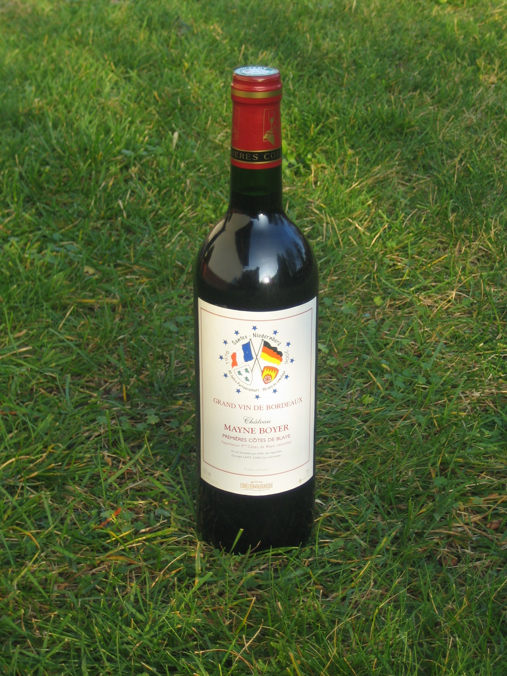 Weinflasche zum 30-jährigen Jubiläum der Städtepartnerschaft Niedernberg-Santes 2006